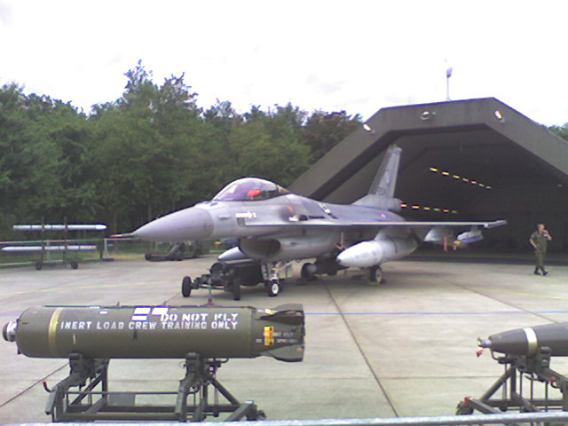 An F-16